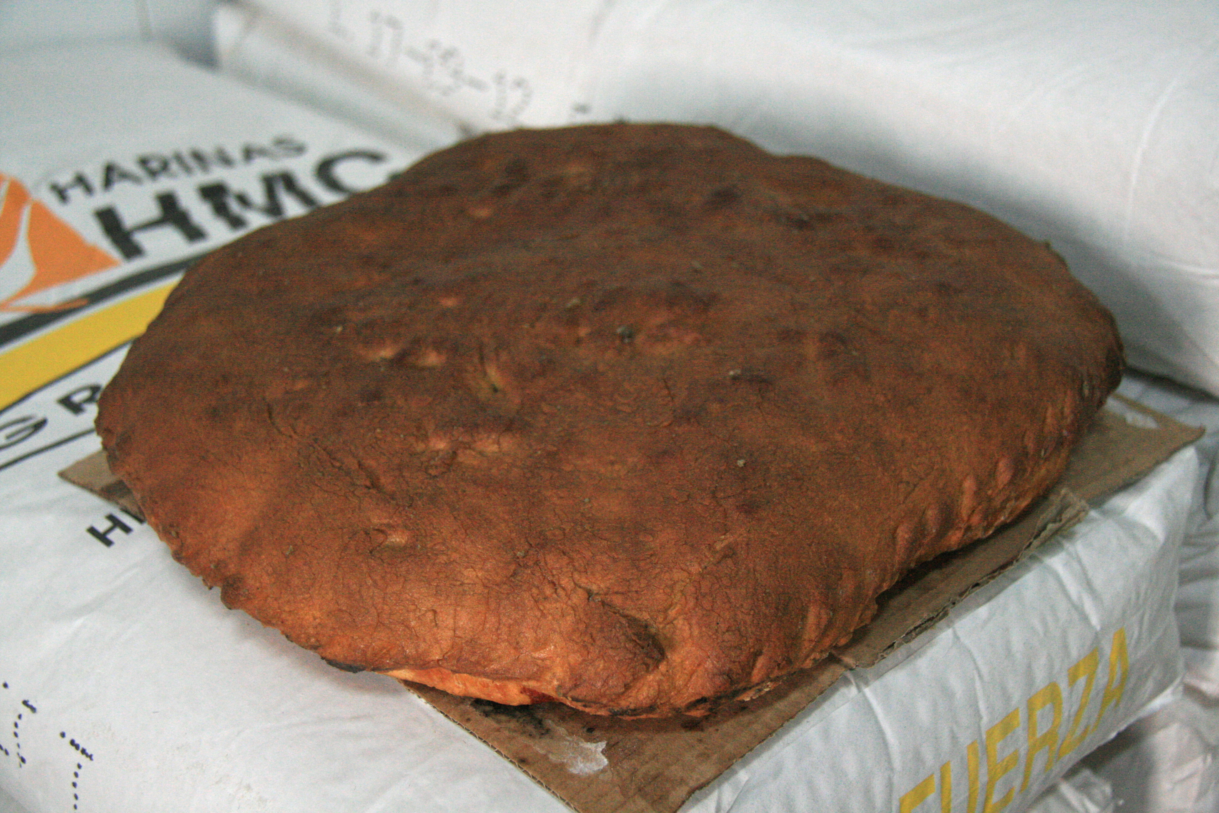 Fleischpastete mit Chorizo und Speck (Zamora)